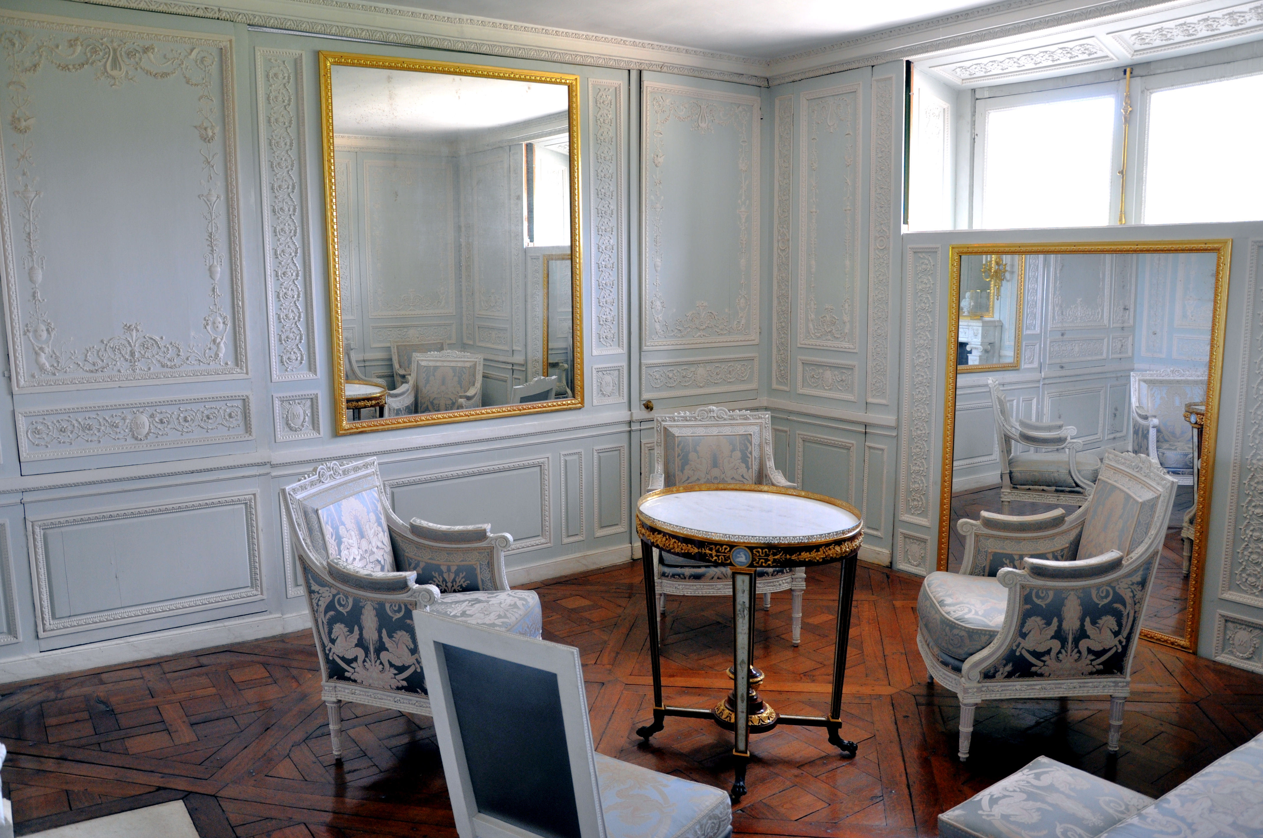 Boudoir de la Reine au Petit Trianon